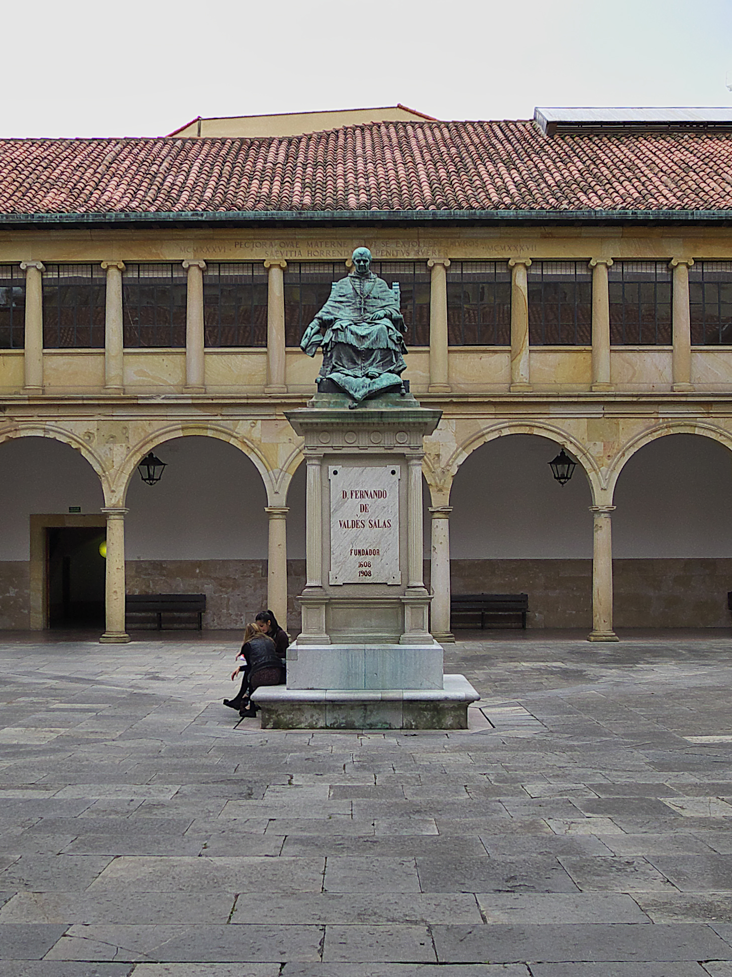 Universidad de Oviedo. Obra en bronce de Cipriano Folgueras Doiztúa (1908)